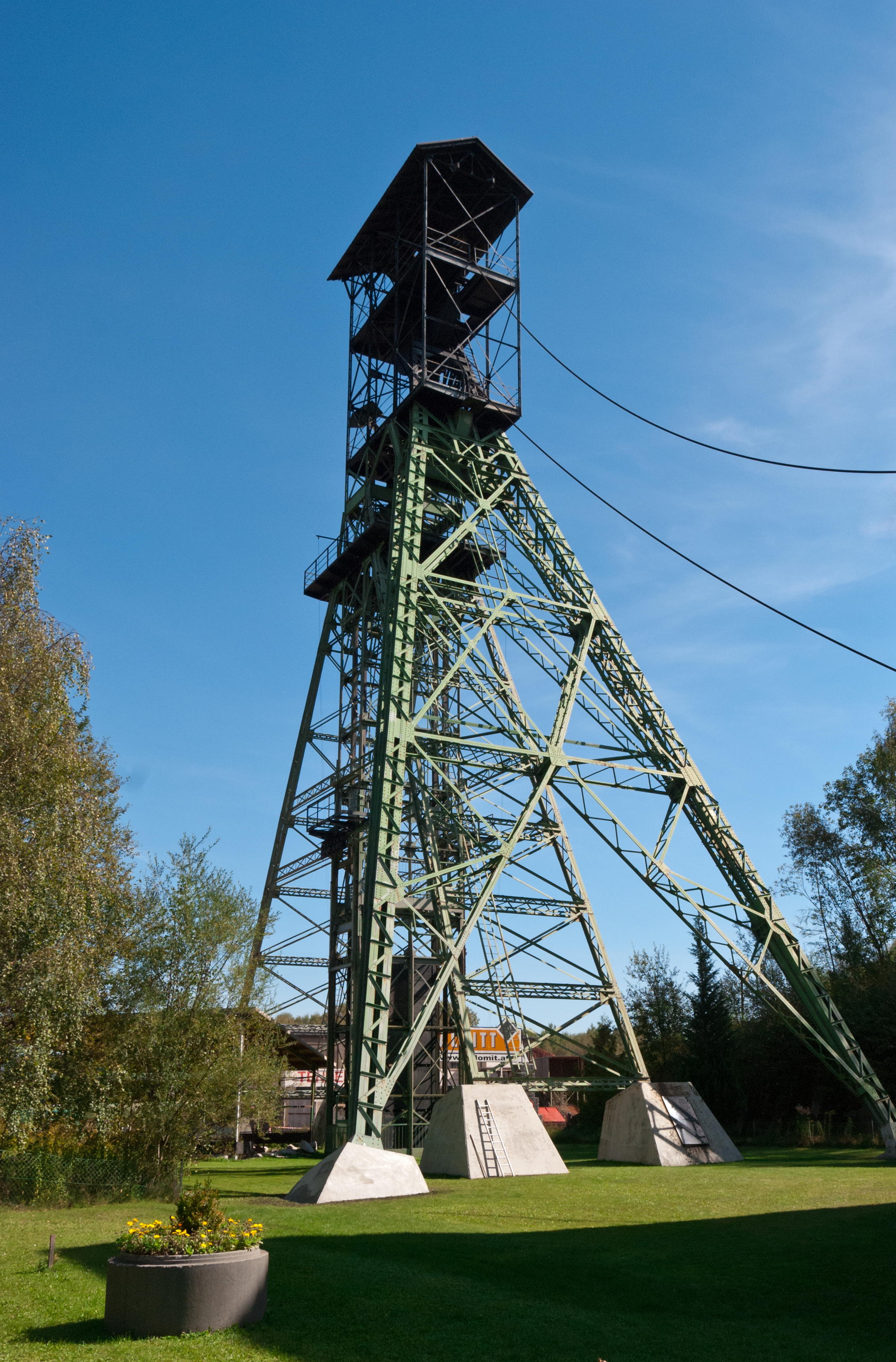 Kohlebergwerk Wodzicki, Förderturm